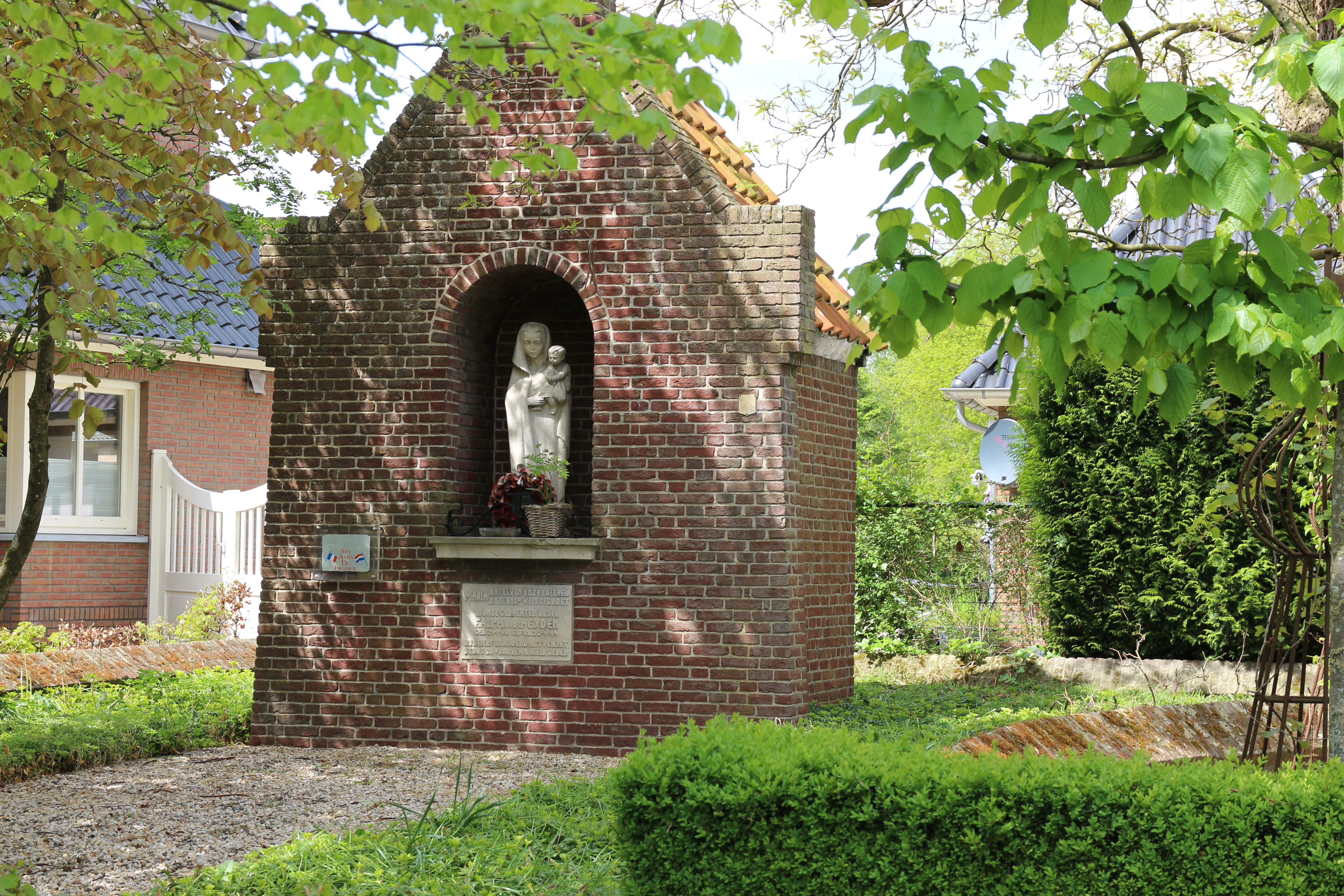 De gedachteniskapel voor Fons van der Heijden, verzetsstrijder 1896-1944, op 20 september, in het zicht van de bevrijding, door de nazi's vermoord. Het is een klein bakstenen gebouwtje uit 1947 met een nis, waarin zich een mooi eenvoudig zandstenen Mariabeeld bevindt en enkele herinneringen van de vrienden uit Frankrijk en Wales.